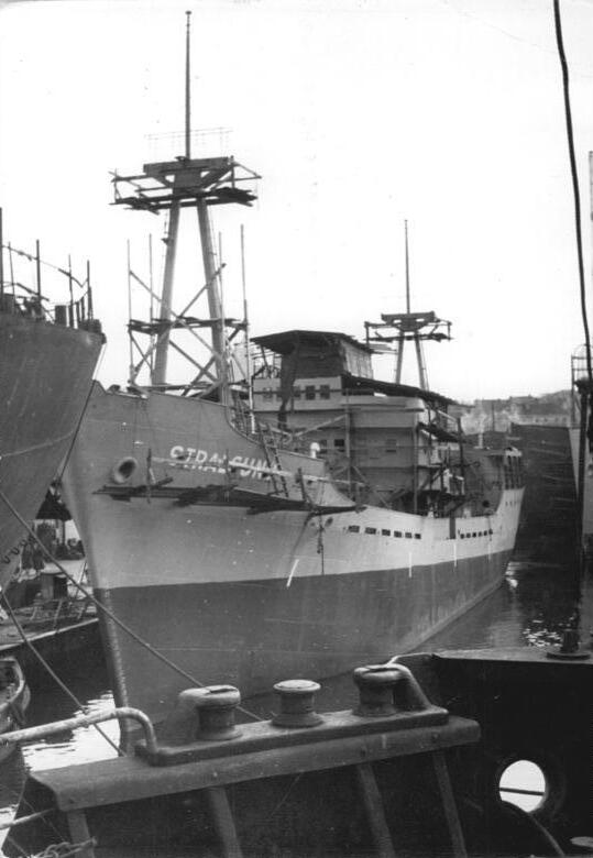 Wismar, Mathias-Thesen-Werft, Ausrüstungskai Zentralbild Quaschinsky-28.4.1954 Sta.-6Lot.- Mathias-Thesen-Werft in Wismar baut Motor-Frachter. In den großen volkseigenen Schiffswerften an der Küste der Deutschen Demokratischen Republik gehen die ersten Frachtschiffe für unsere Handelsflotte ihrer Vollendung entgegen . Auf der Mathias-Thesen-Werft in Wismar werden in den Motor-Frachter "Stralsund" zur Zeit die Maschinen eingebaut. Die "Stralsund", ein 1.000-BLT-Schiff, wird dem VEB Seereederei vor allen für den Verkehr mit der Sowjetunion, der Volksrepublik Polen und den skandinavischen Ländern übergeben werden. UBz: Der Motor-Frachter "Stralsund".